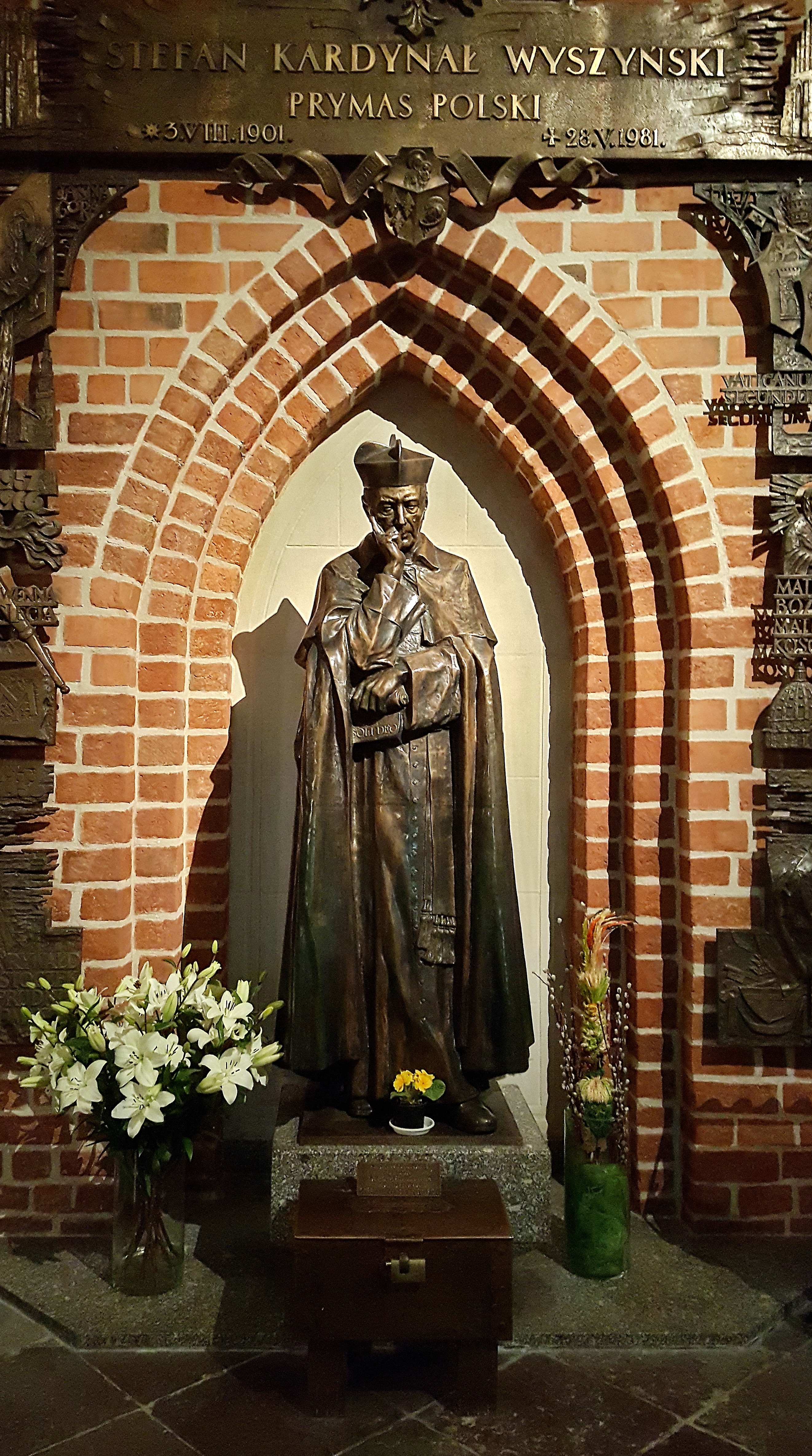 Pomnik Stefana Wyszyńskiego w Bazylice prymasowskiej Wniebowzięcia Najświętszej Maryi Panny w Gnieźnie (autor pomnika - polski rzeźbiarz Wawrzyniec Samp).